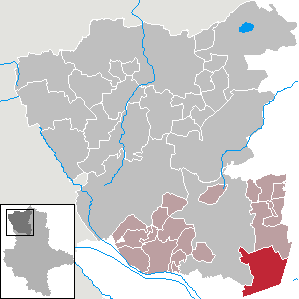 (Original text: Letzlingen im Landkreis Salzwedel)